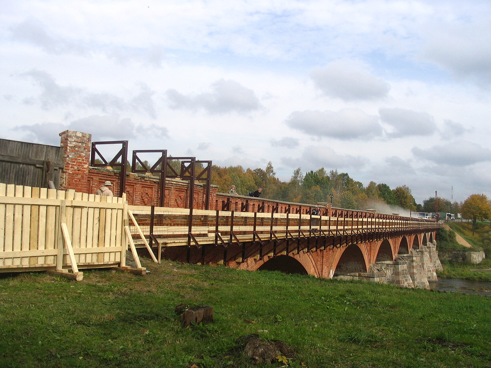 Brick bridge over Venta